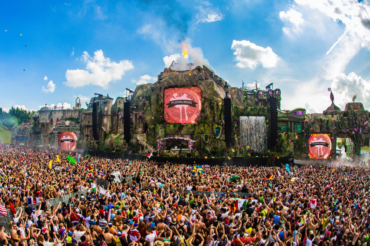 Plekklindid Tomorrowland festivalil Belgias 2016